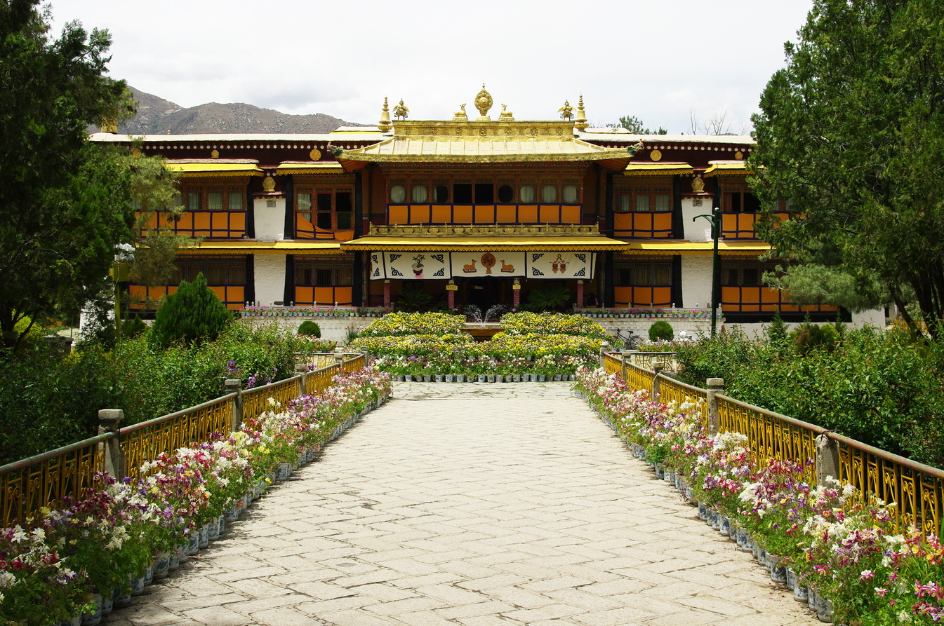 Tagten Minjur Phodrang, Norbulingka-Park